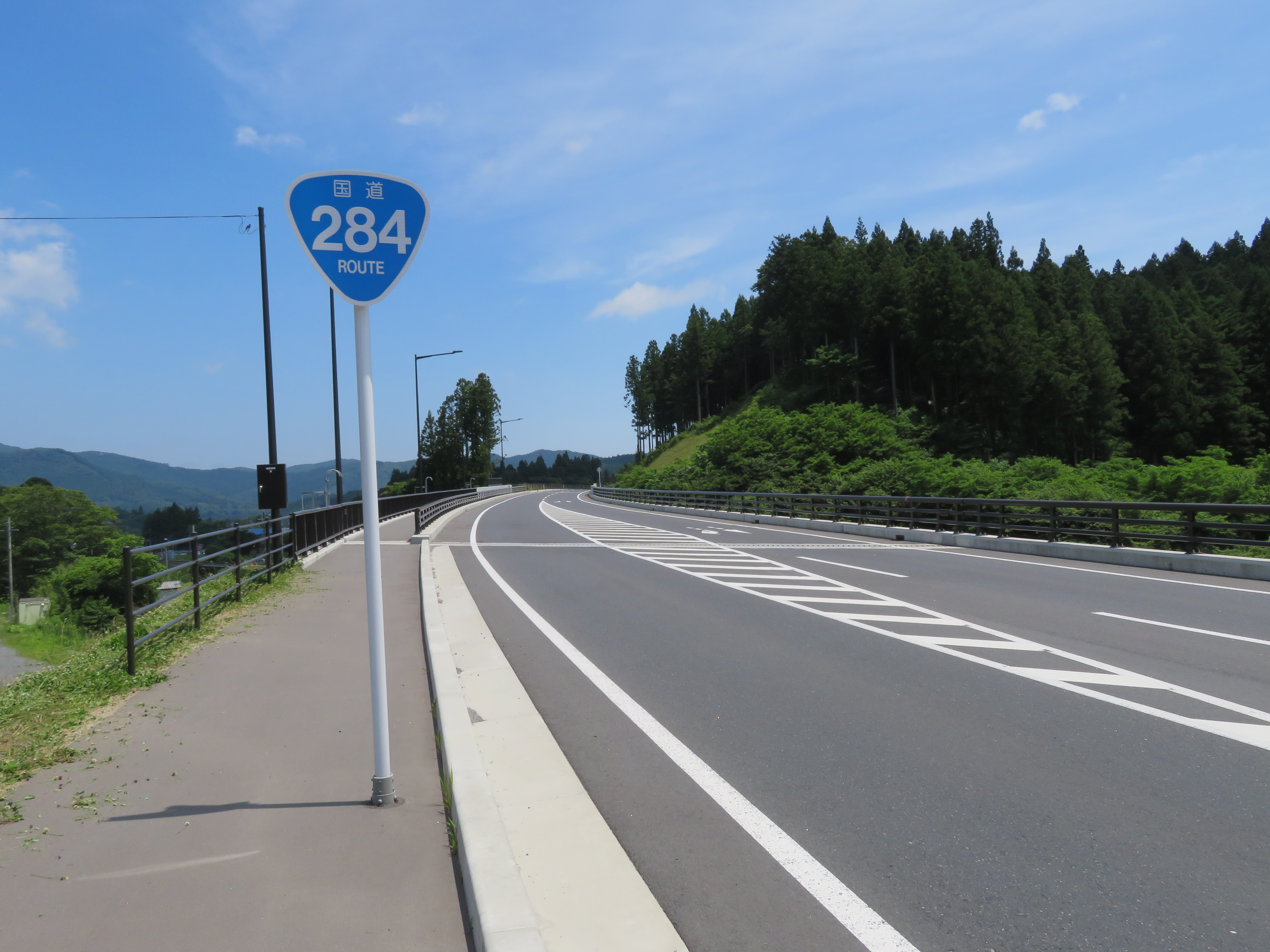 国道284号線 室根バイパス 岩手県一関市室根町矢越字大畑付近（気仙沼方面を撮影）